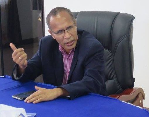 Alcino de Araújo Báris, Direktor der CNE